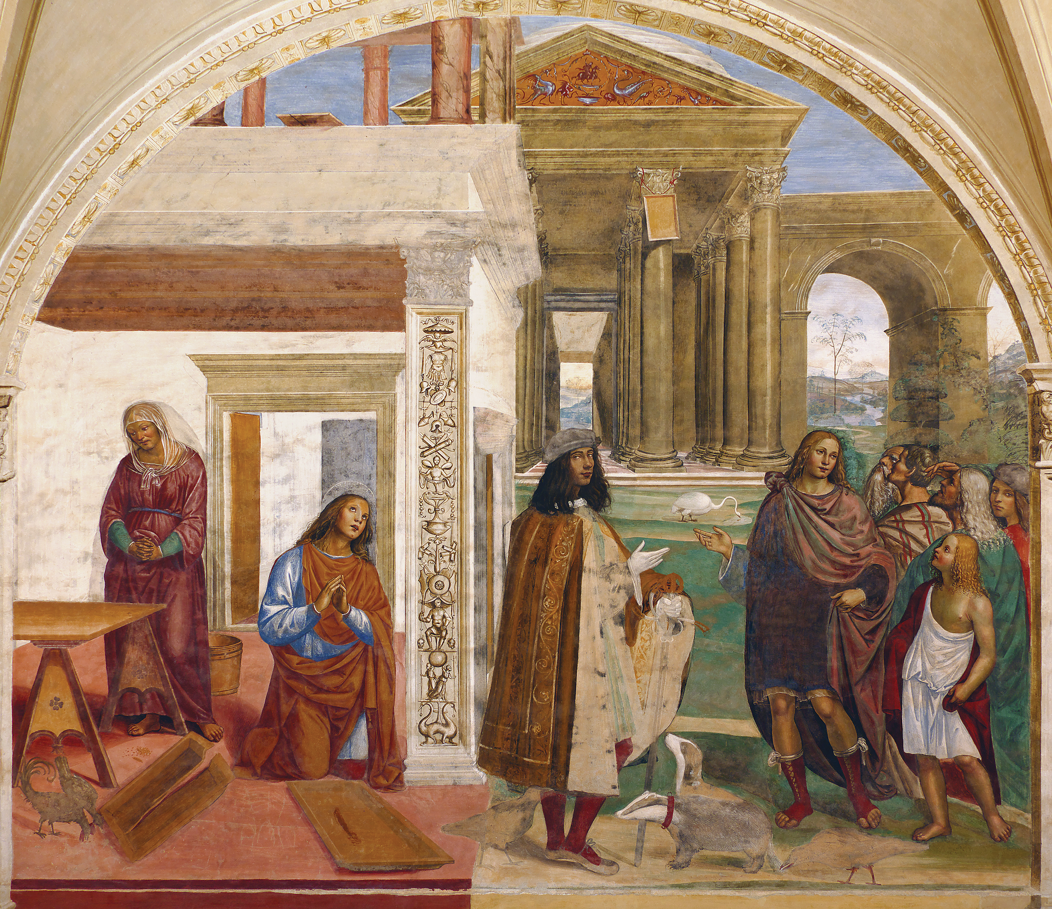 Сломљено и чудесно поправљено решето (oko 1502), Велики клаустар манастира Монте Оливето Мађоре